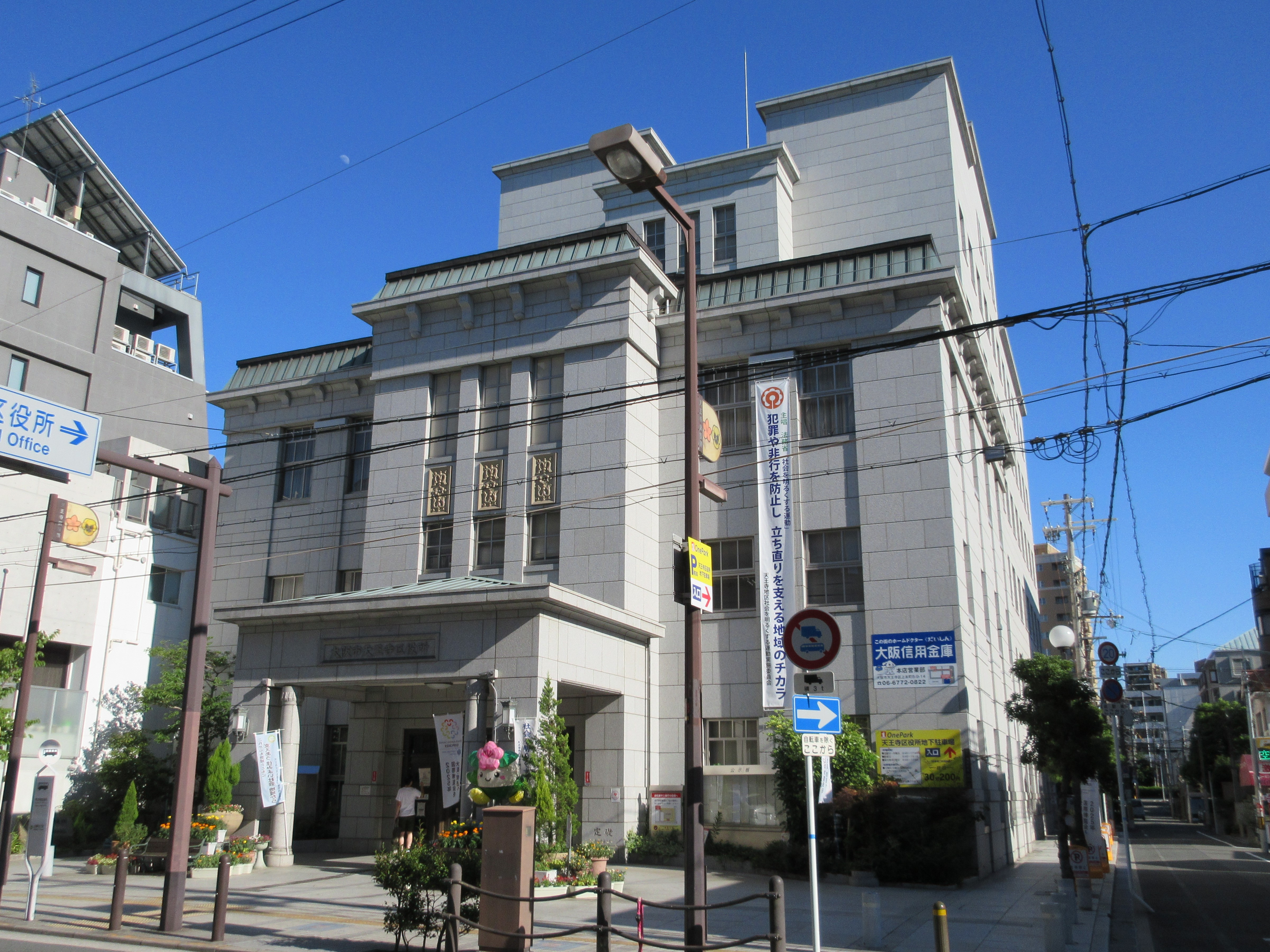 天王寺区役所